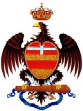 Emblema delle Batterie a Cavallo